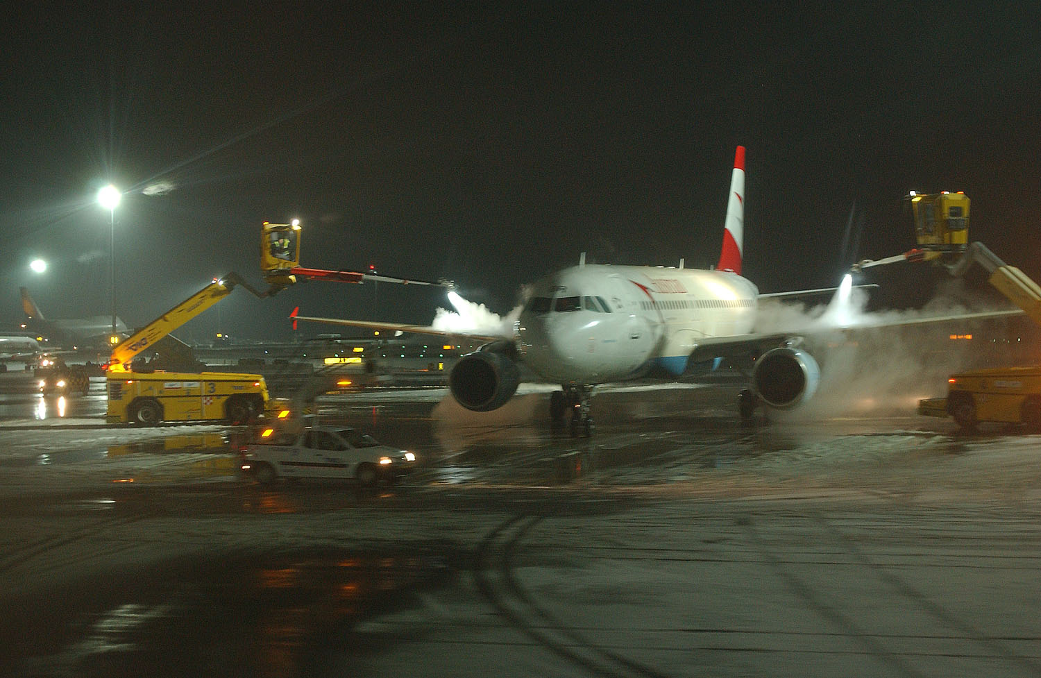 Flughafen Wien-Schwechat: Enteisungsanlage